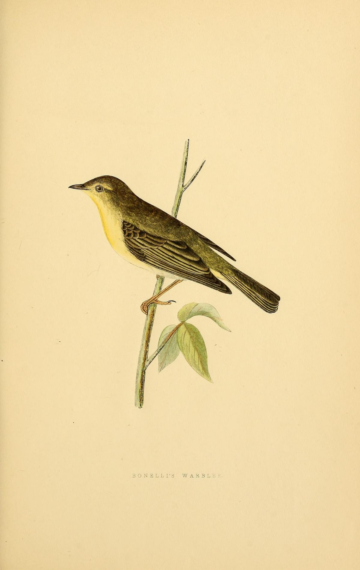 BONELLI'S WARBLi